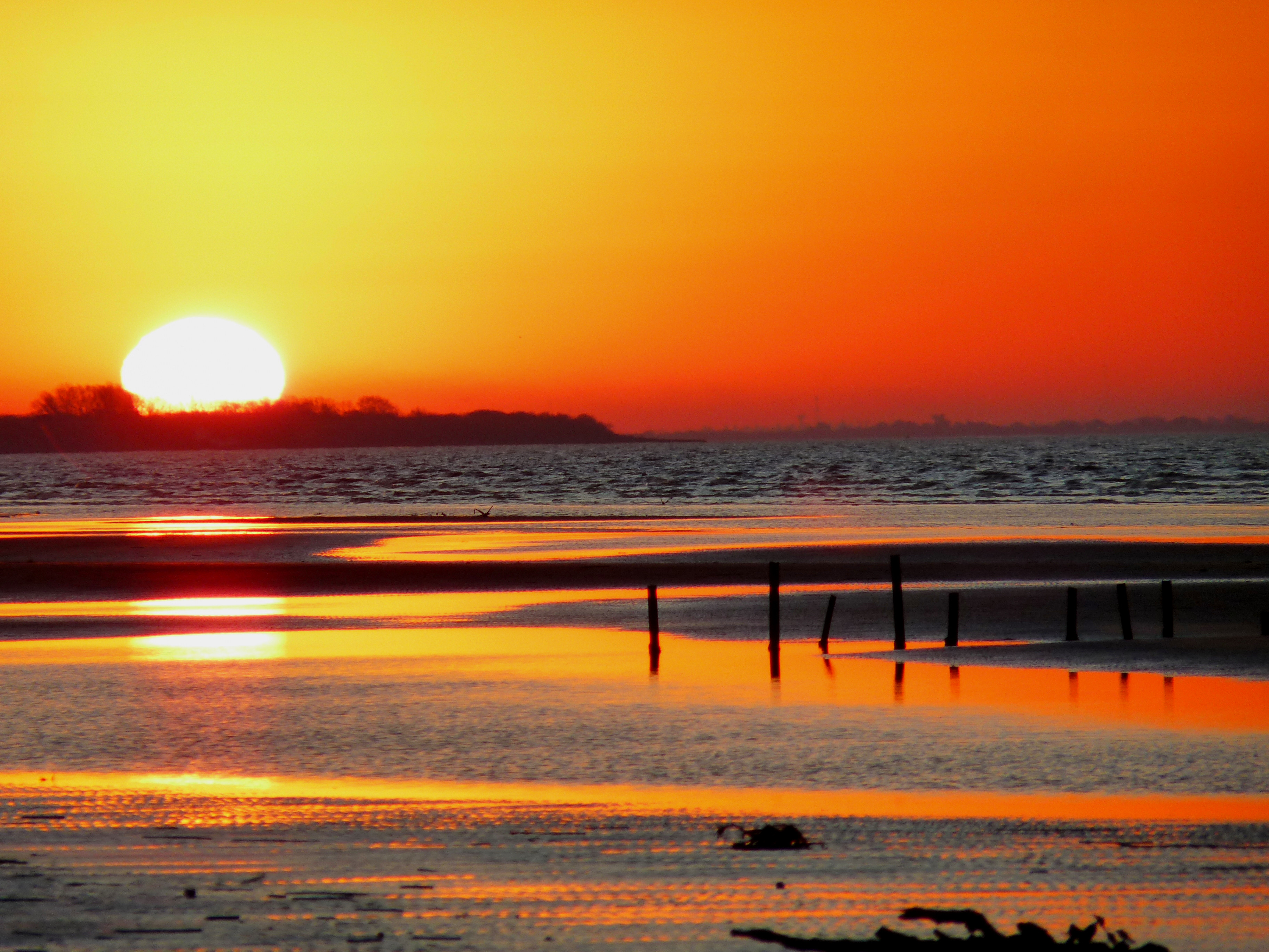 Puesta de sol en Punta Lara en pleno Invierno.